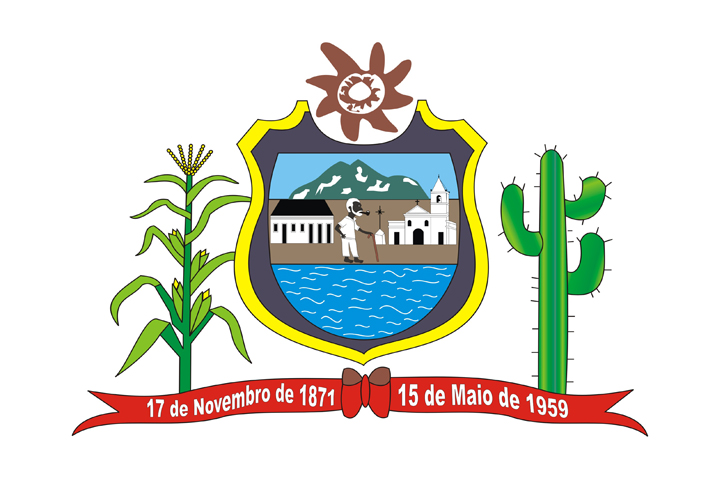 Brasão de Armas do Município de Congo no Estado da Paraíba, Brasil.